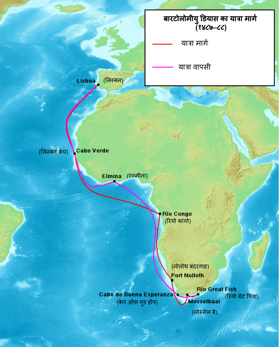 १४८७–८८ में hi:बारटोलोमीयु डियास का मार्ग। Hindi translation of File:Bartolomeu Dias Voyage.PNG